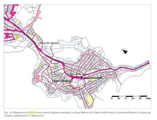 planimetria Baronale di Fabrizia antica